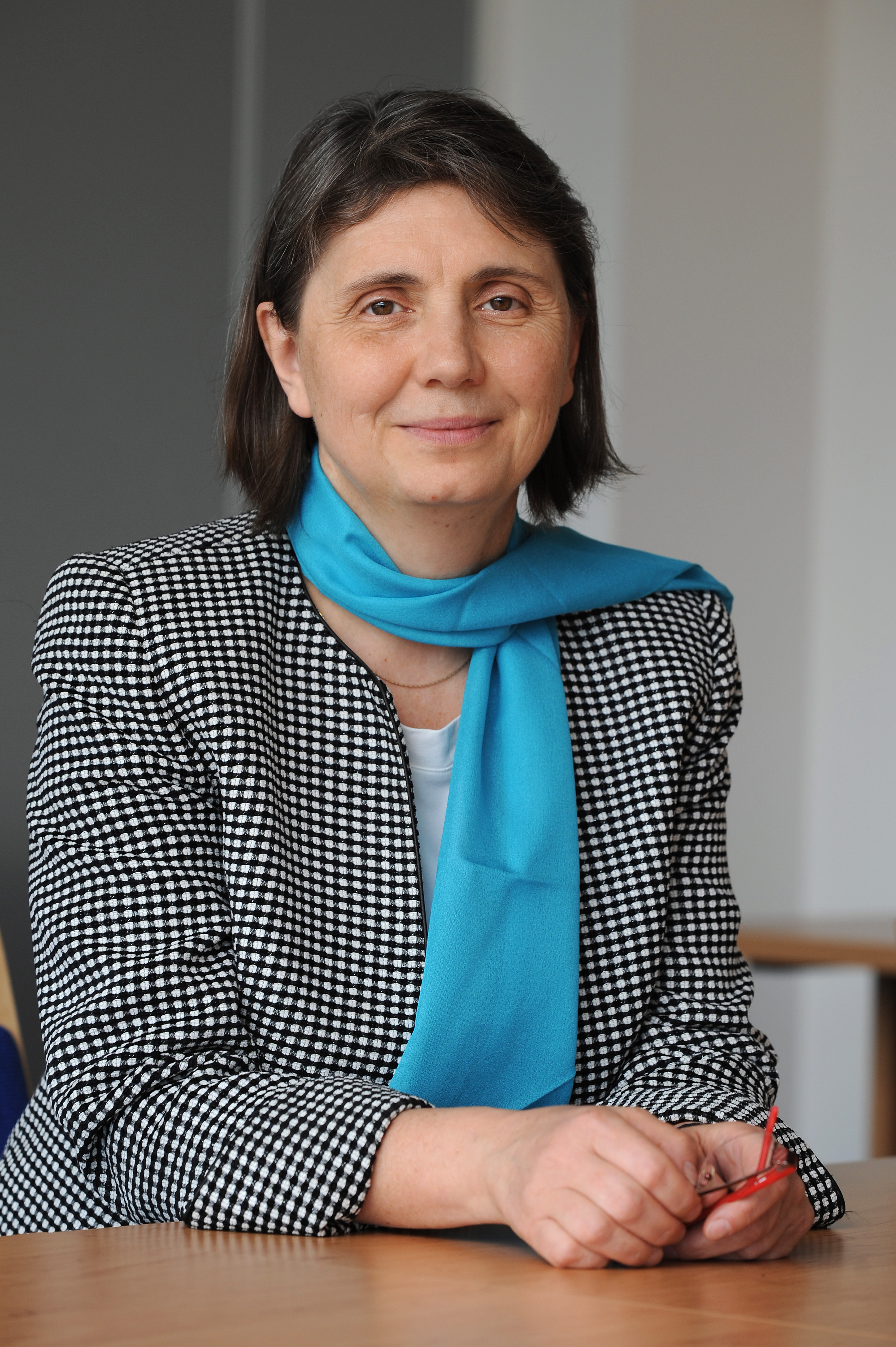 Ing. Rut Bízková - předsedkyně